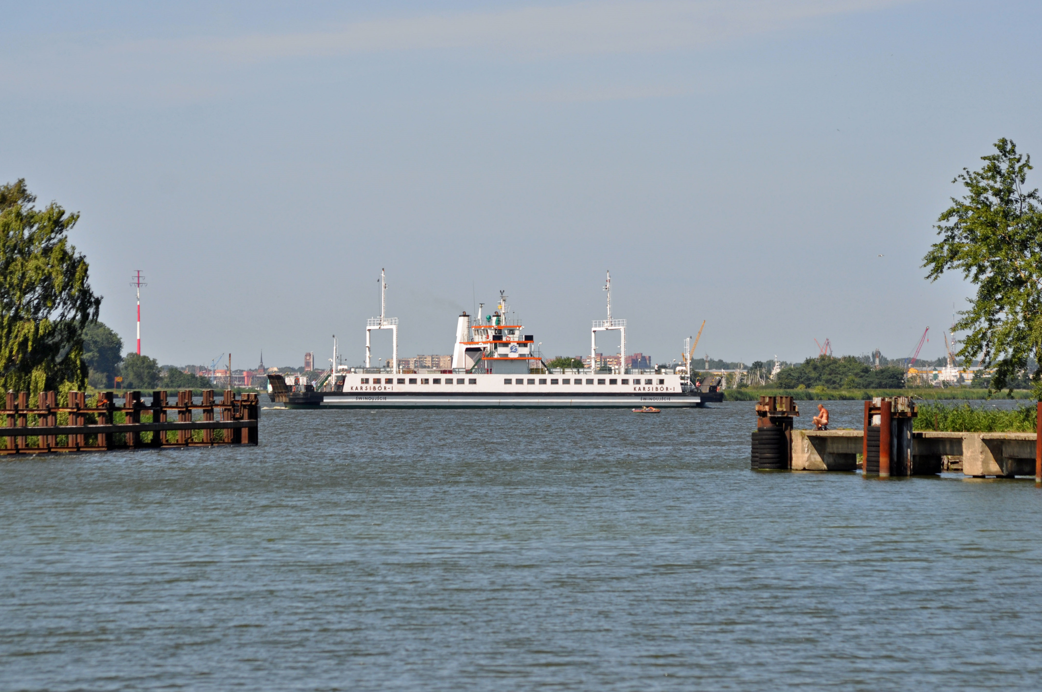 Świnoujście, Fähre, a (2011-08-02) by Klugschnacker in Wikipedia